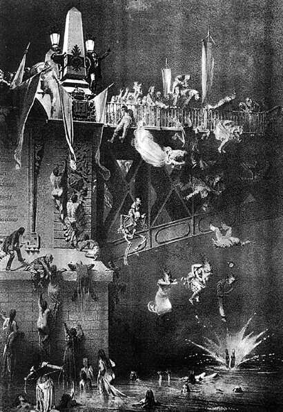 Zichy Mihály illusztrációja